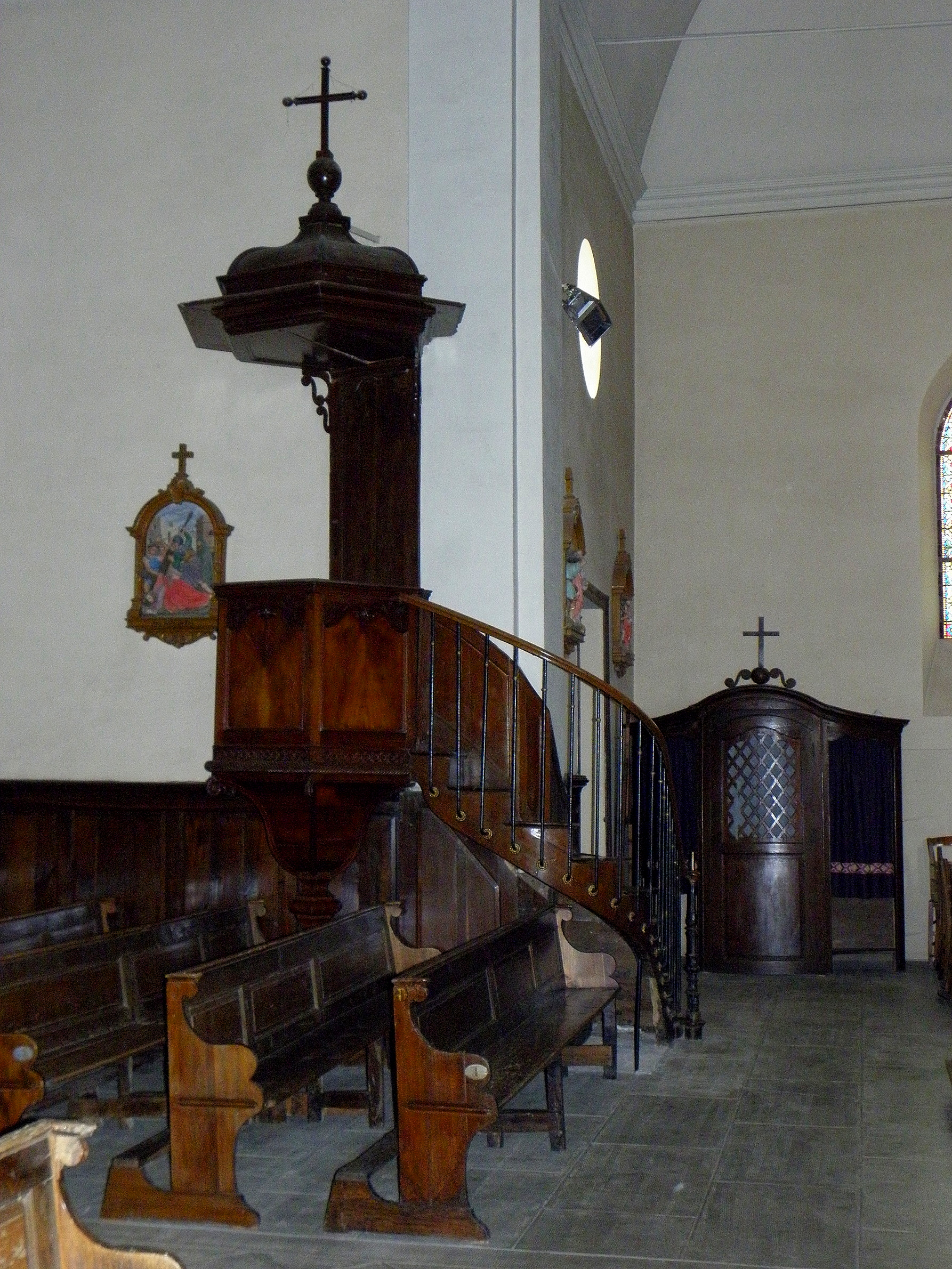 Intérieur de l'église Notre-Dame de Brie (35).